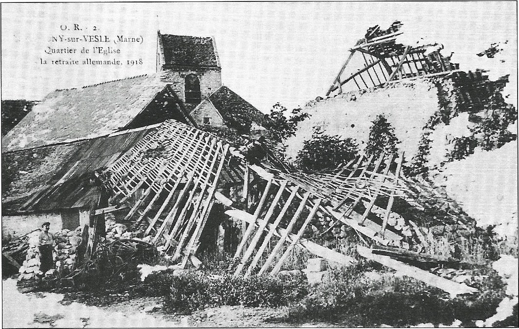 Carte postale ancienne . Montingy sur Vesle les destructions de la Première Guerre mondiale .